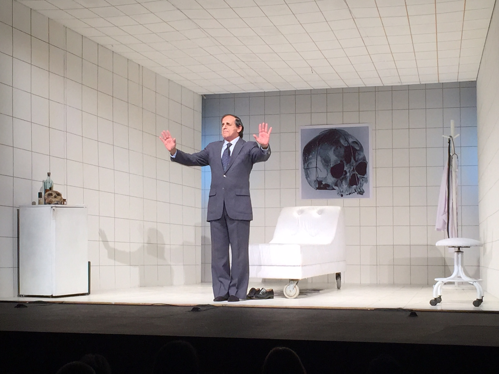 El actor Héctor Manrique durante su interpretación del psiquiatra Edmundo Chirinos en el monólogo Sangre en el Diván. (Teatro Municipal de Chacao, Caracas).